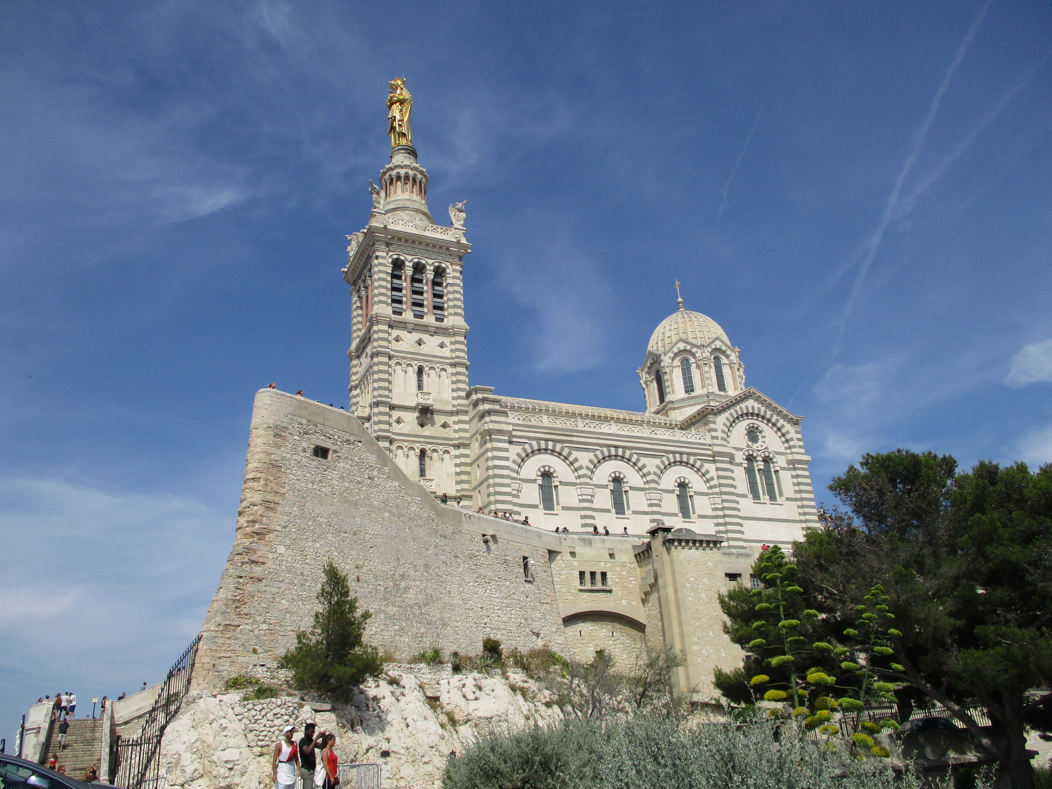 Basilique Notre-Dame de la Garde